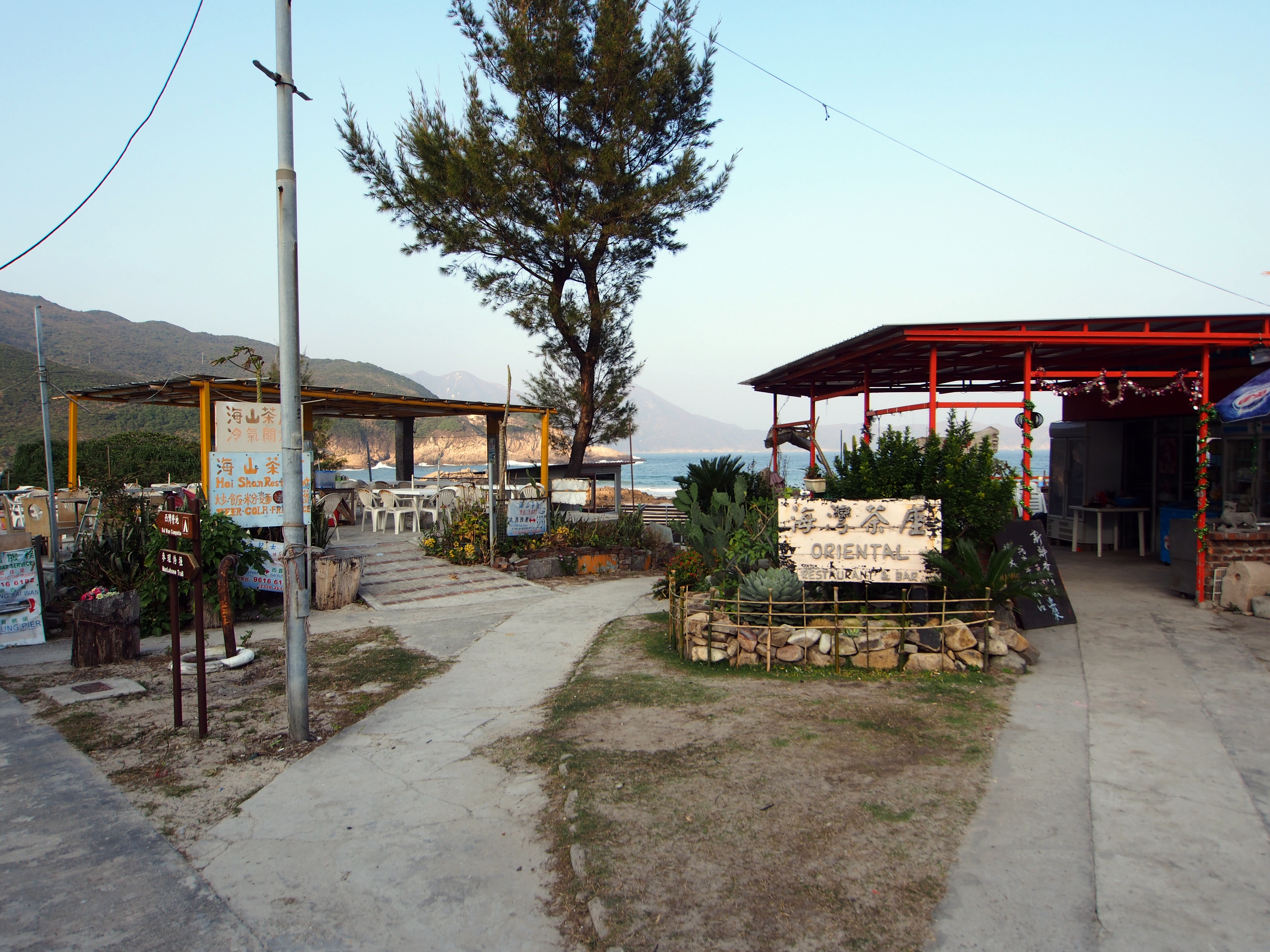 西湾村 - Sai Wan Village - 2015.01